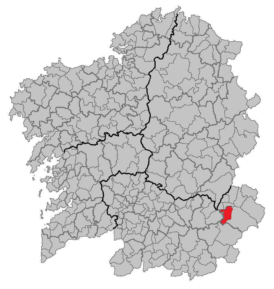 Mapa coa localización do concello de O Bolo.